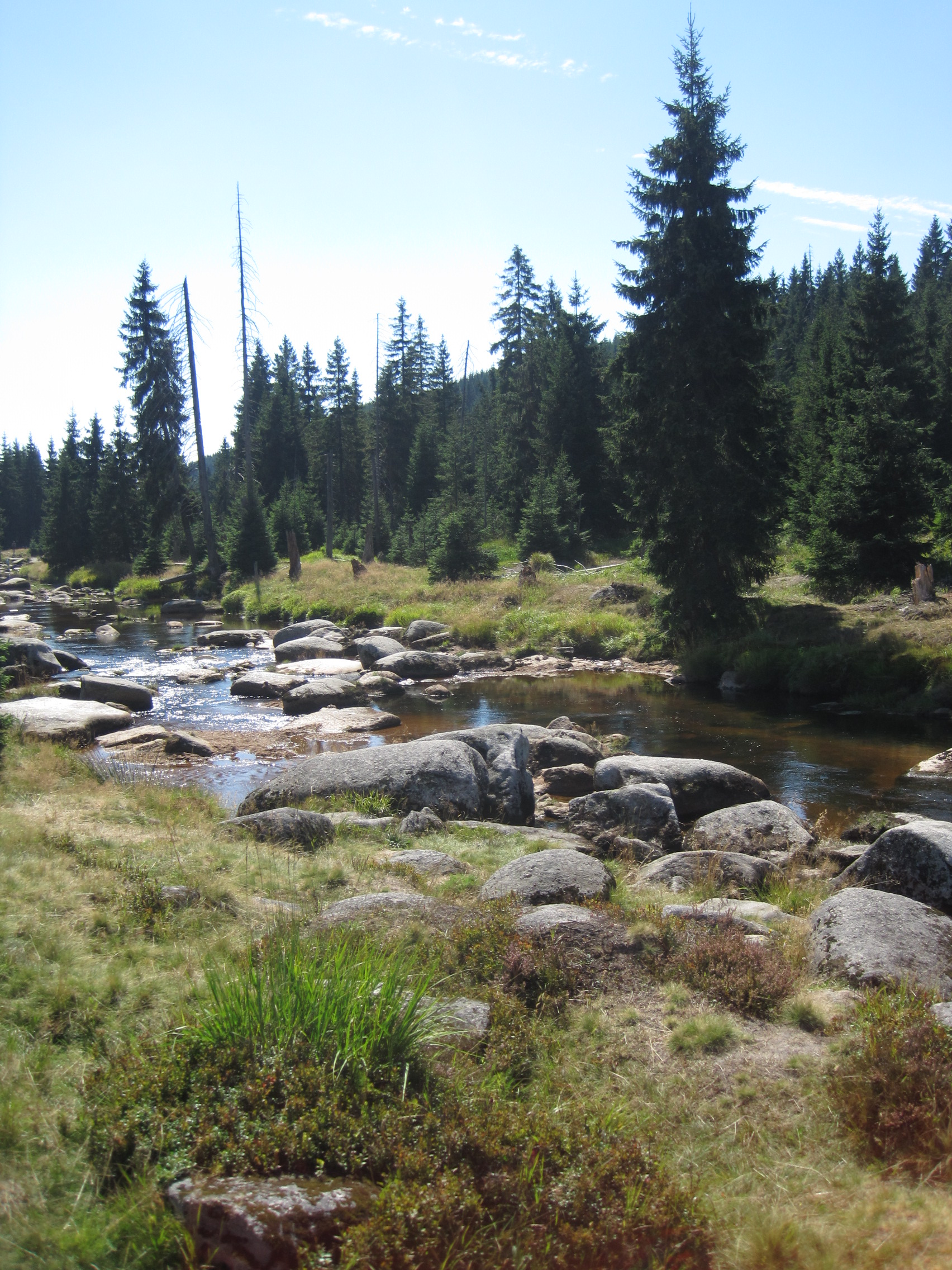 NPR Rašeliniště Jizery a Rezerwat przyrody Torfowiska Doliny Izery